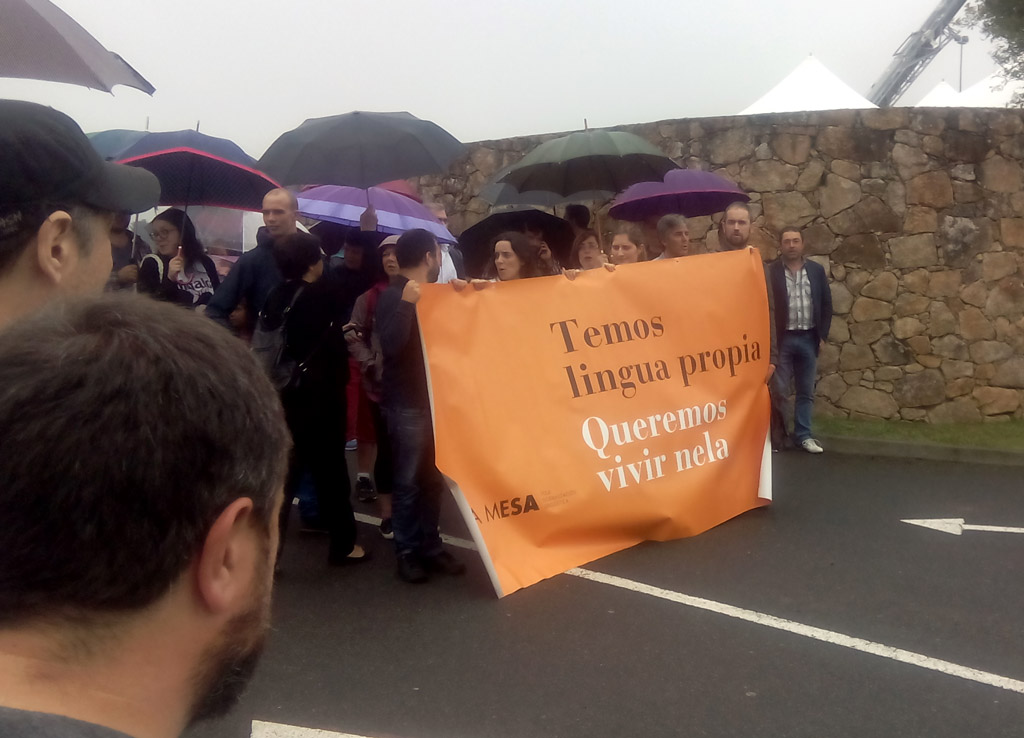 Concentración contra a discriminación dunha nena de 10 anos por falar en galego en Casas Novas, Arteixo.